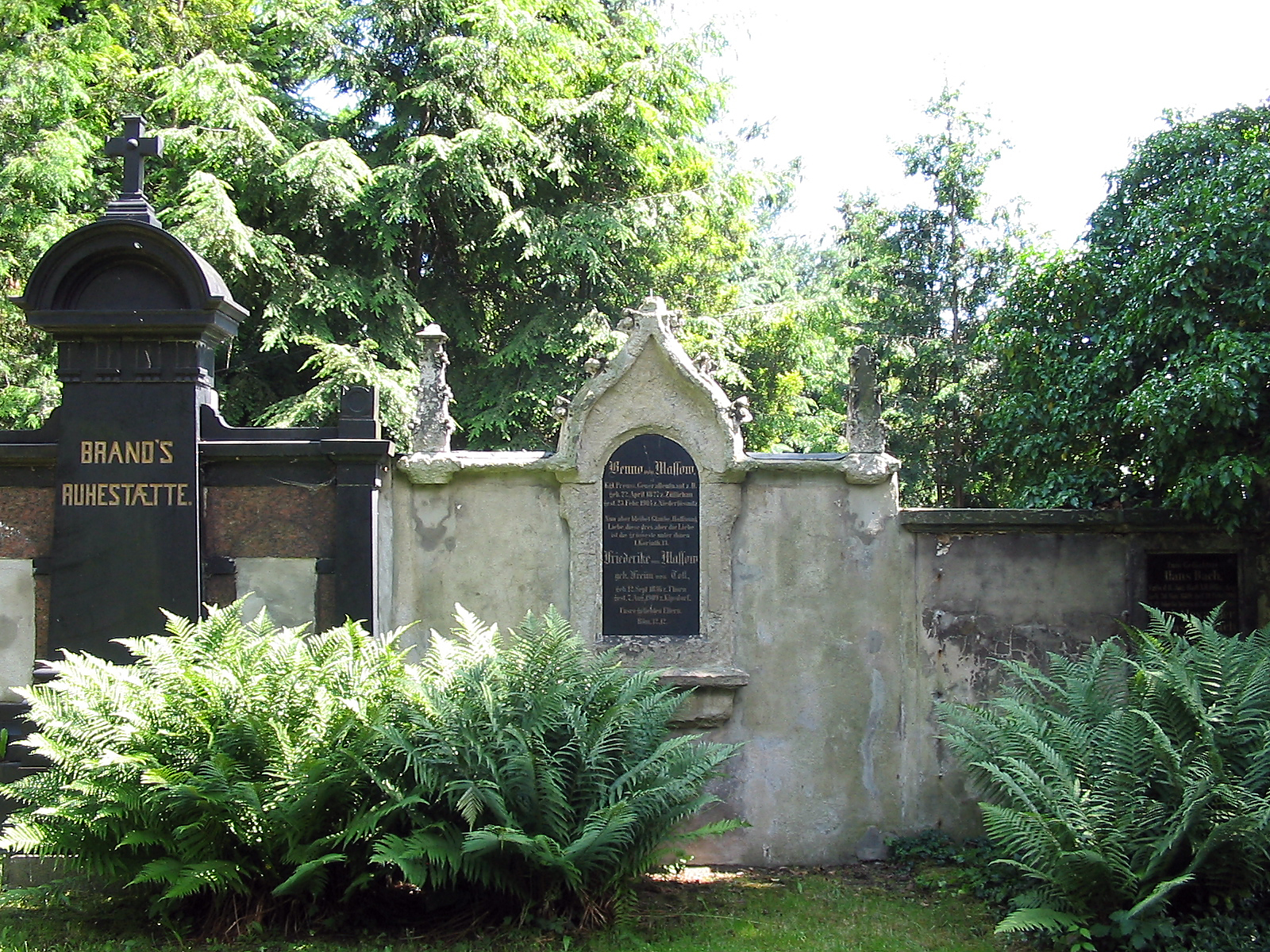 Radebeul, Friedhof Radebeul-West, Grabmal Benno von Massow und Frau Friederike geb. Freiin von Toll